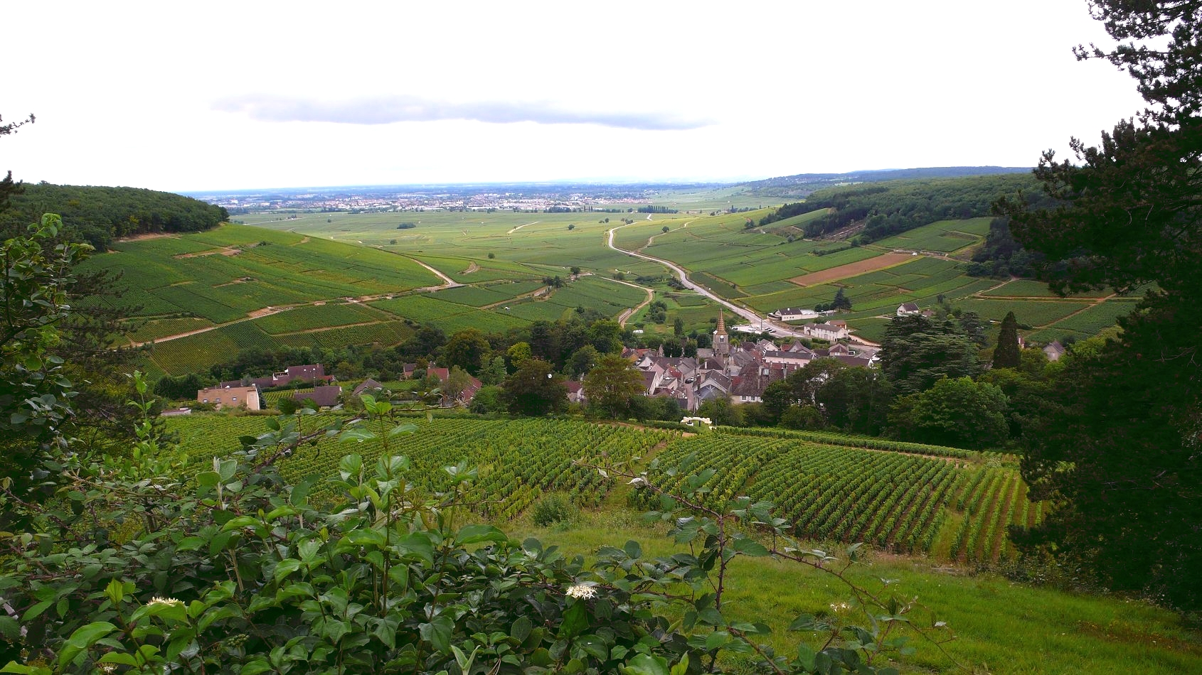 Pernand-Vergelesses, Côte-d'Or, Burgund; Blick nach Süden, im Hintergrund Beaune, links der Corton-Berg